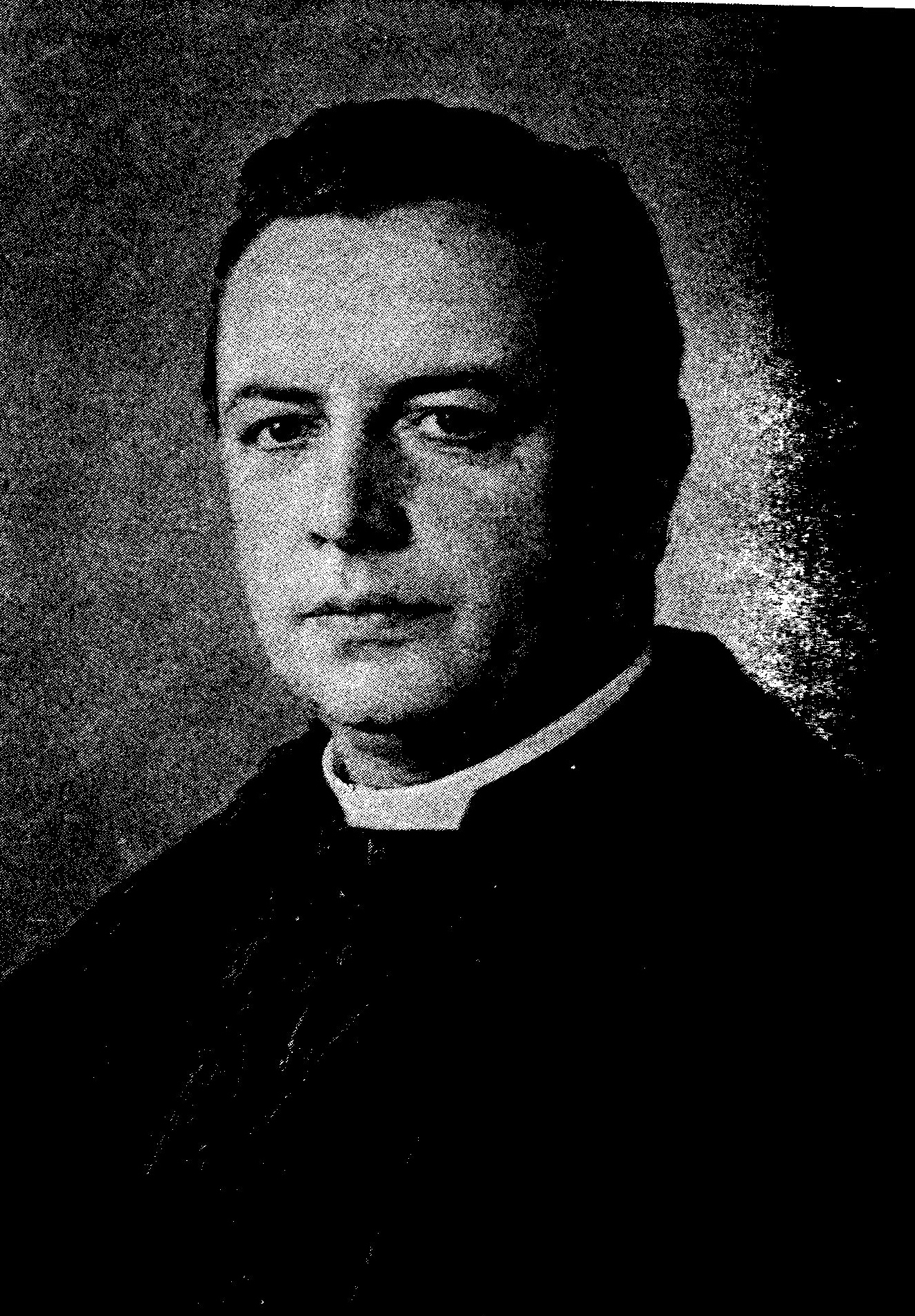 portret